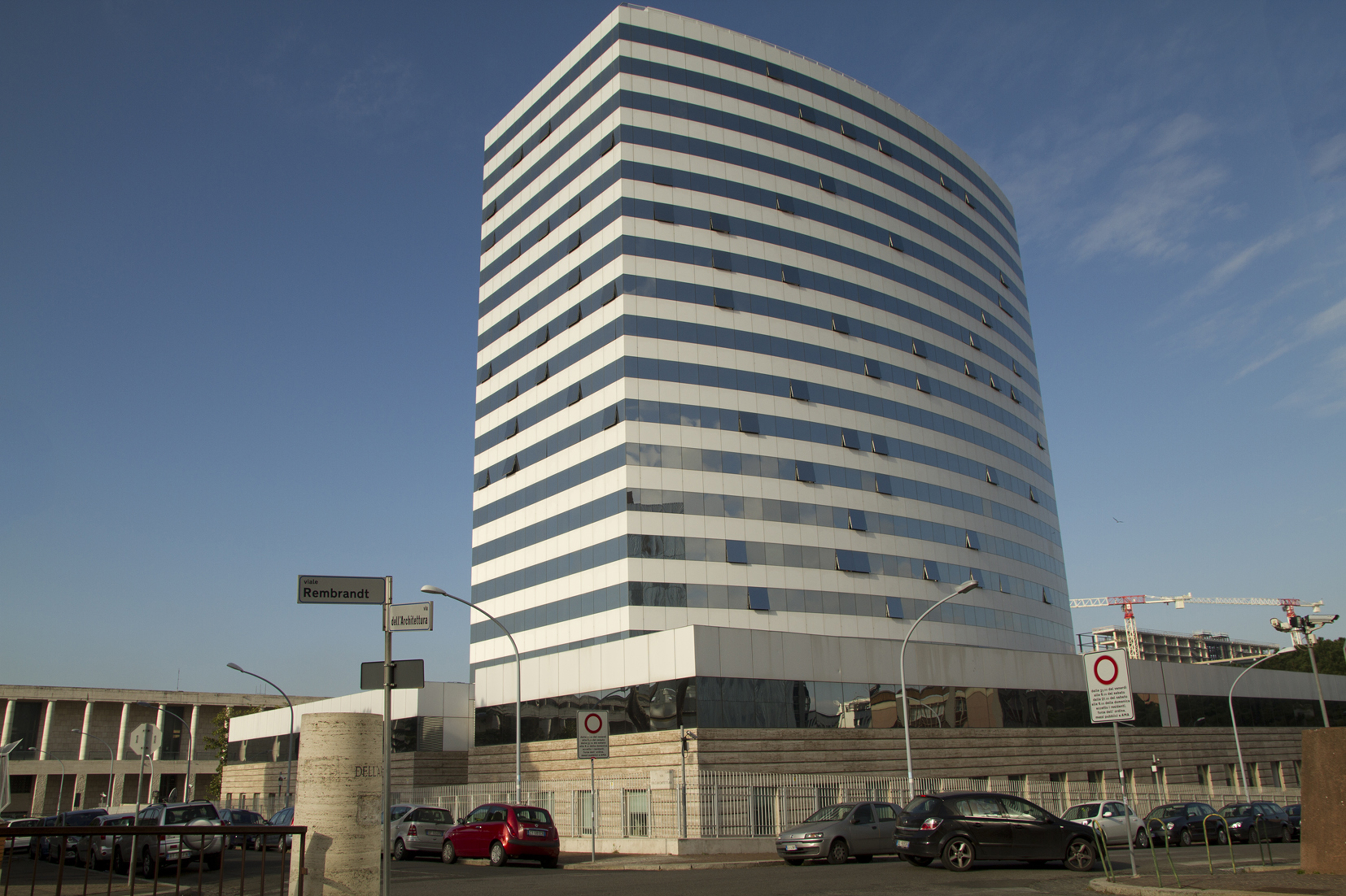 Palazzo dell'INAIL